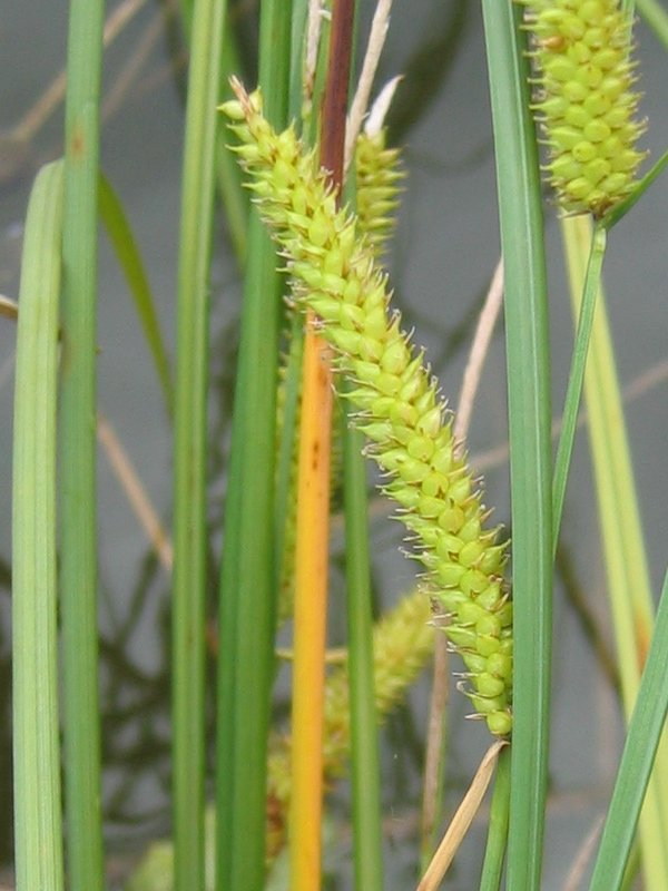 weibliche Ähre der Schnabel-Segge Carex rostrata, Weißer See, Mecklenburg-Vorpommern